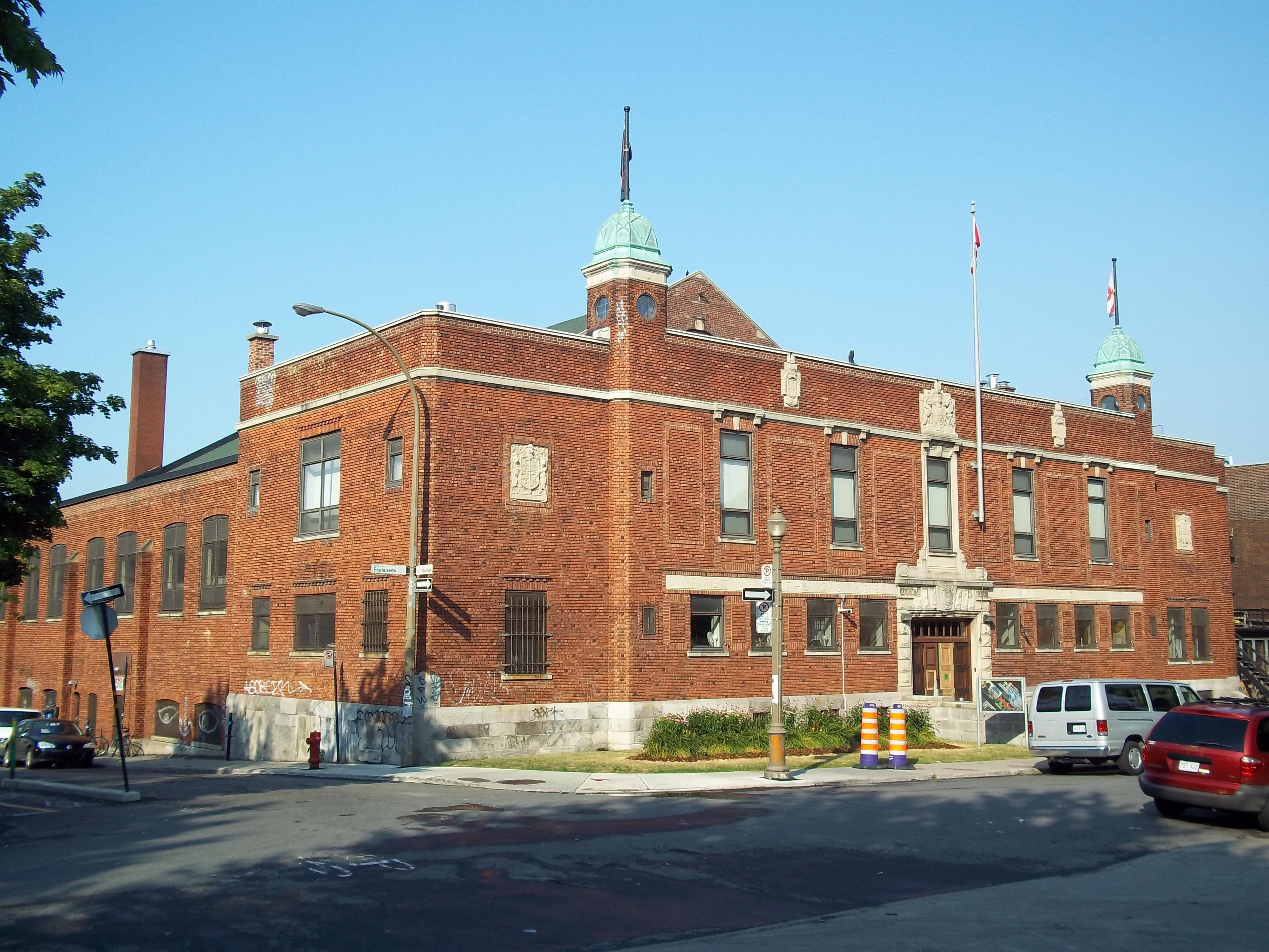 Manège militaire The Canadian Grenadier Guards, 4171 avenue de l'Esplanade, Montréal